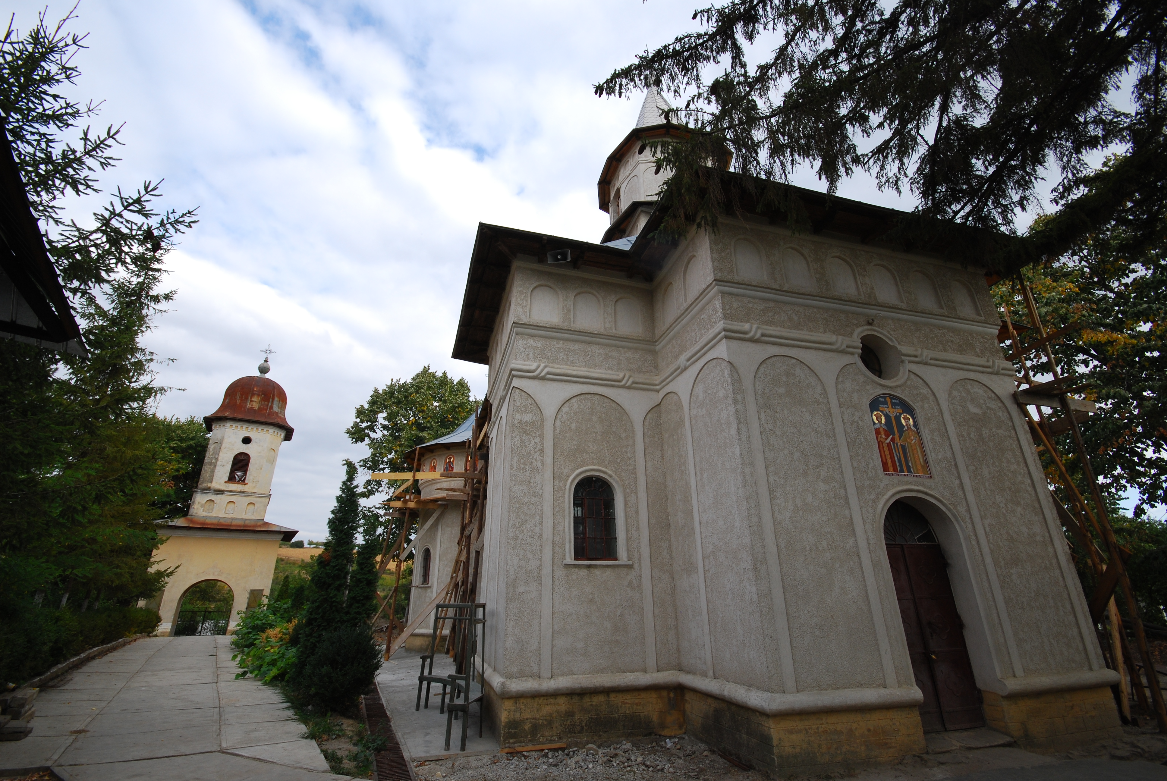 Biserica "Sf. Voievozi"